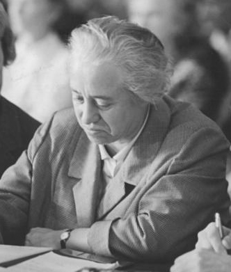 Annemarie Doherr, Korrespondentin der "Frankfurter Rundschau"